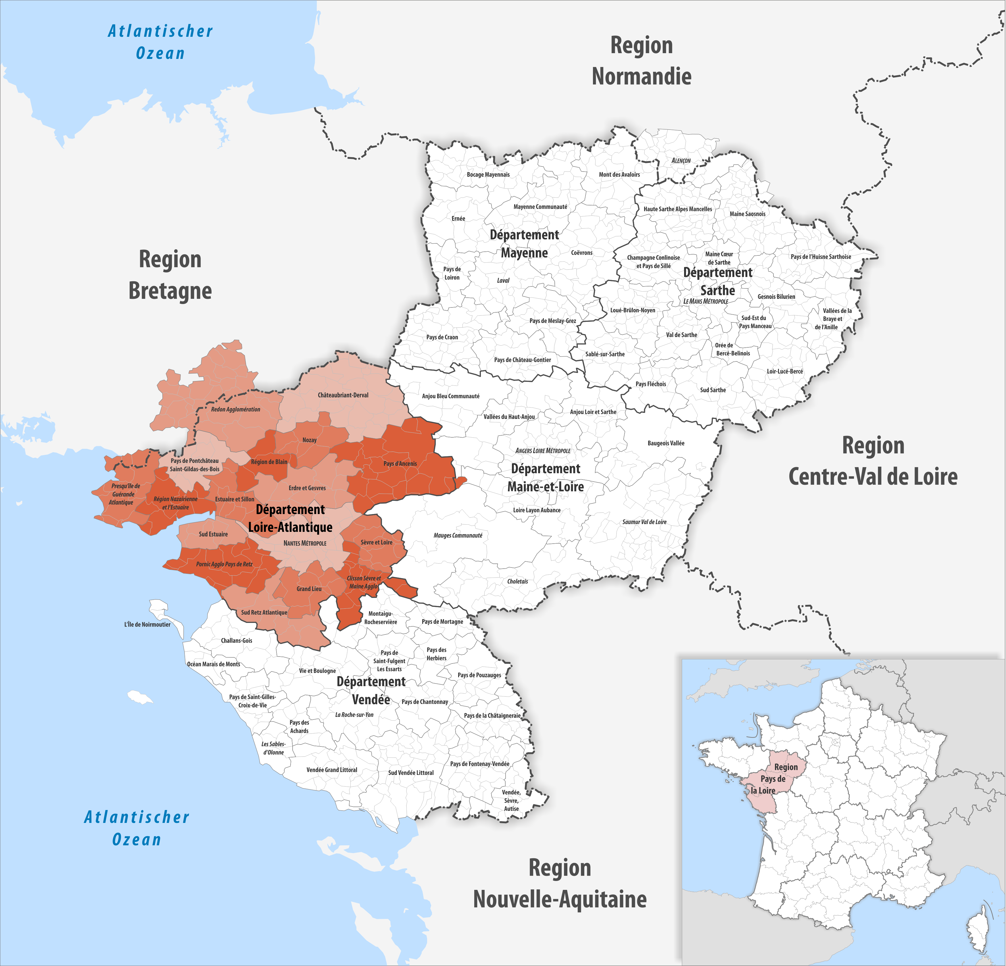 Gemeindeverbände im Département Loire-Atlantique